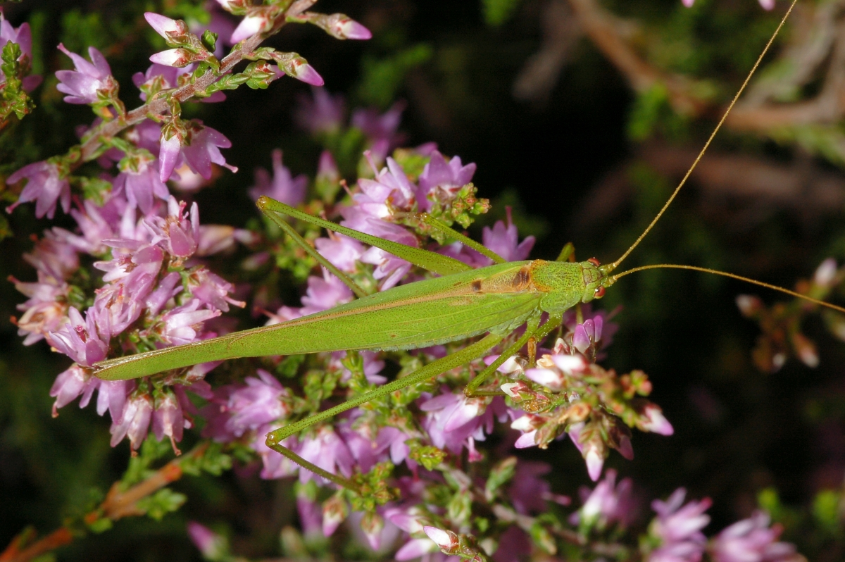 Gemeine Sichelschrecke (Phaneroptera falcata), Stromtrasse neben der Startbahn West, Kelsterbach, Hessen, Deutschland